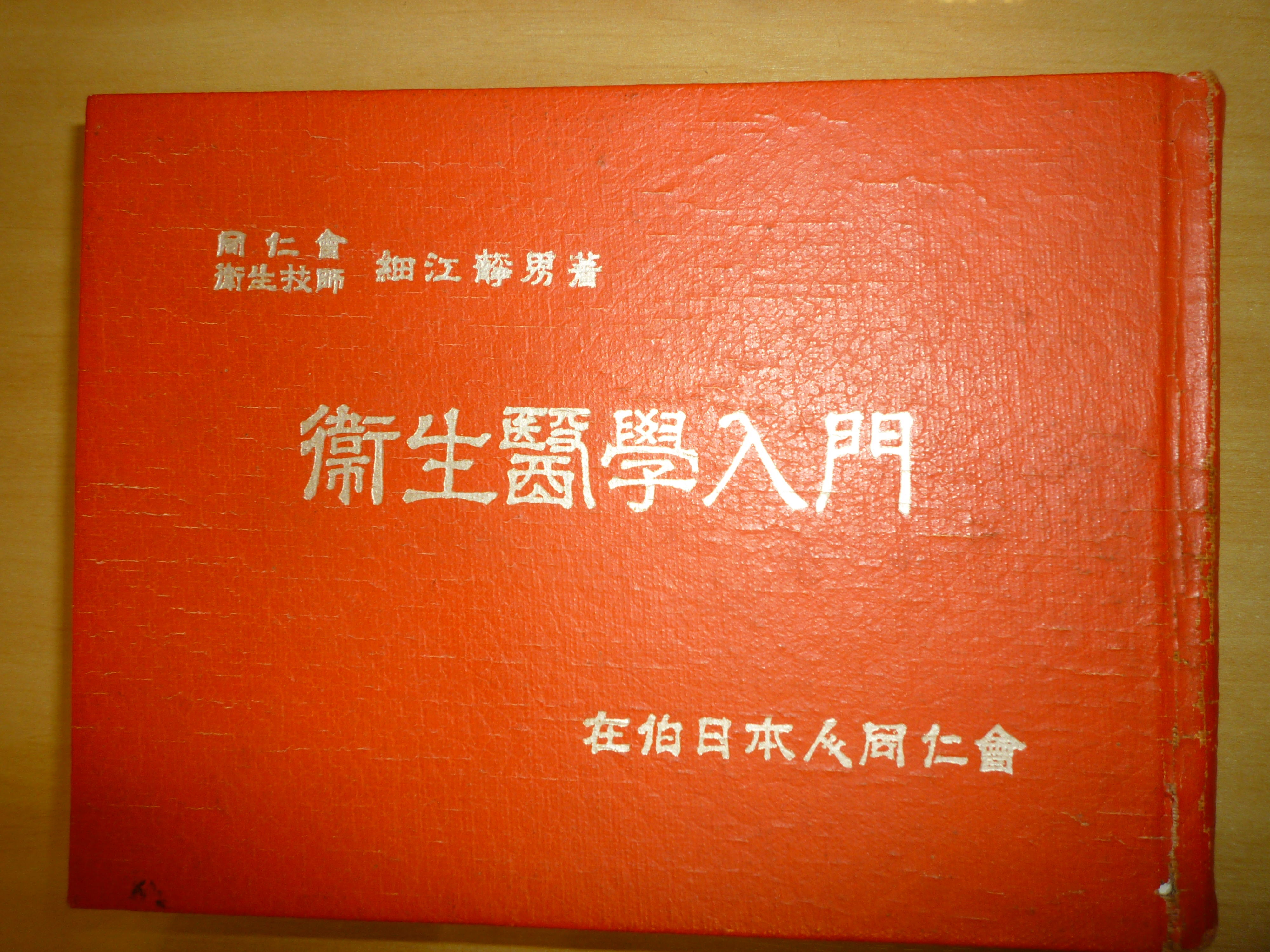 同仁会所属時に細江静男医師が書いた家庭医学書。たぶん、戦前のもの。